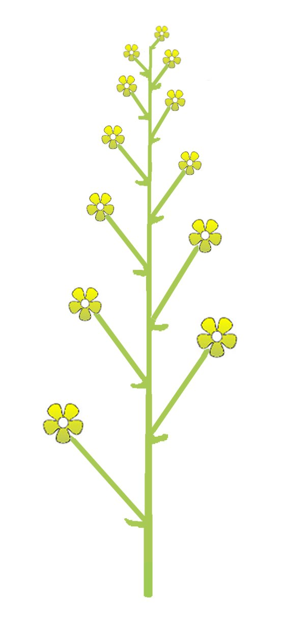 (nl: bloeiwijze tros) flower arrangement